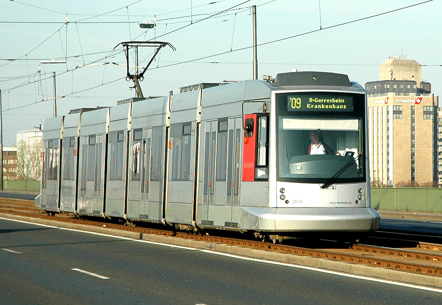 Rheinbahn tram van het type Combino NF 10 nr: 2034 op 31 oktober 2005 te Düsseldorf